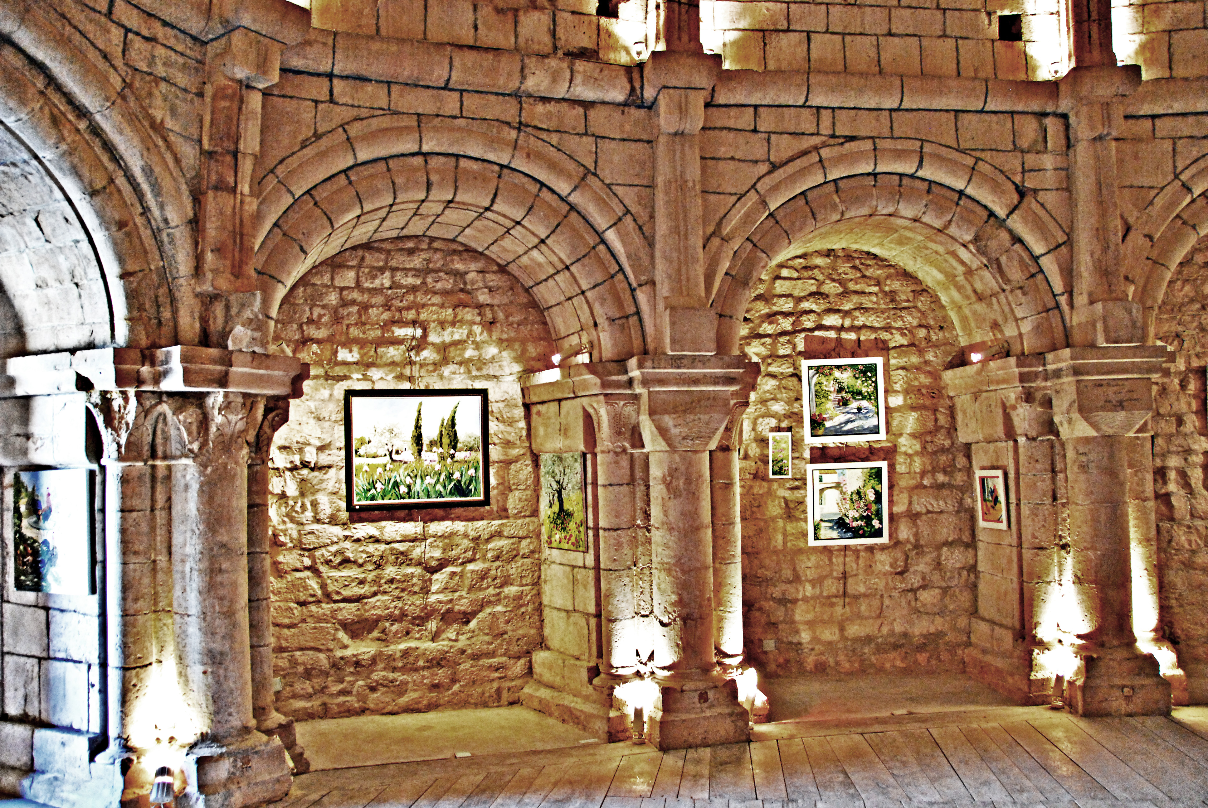 Chateau de Simiane-la-Rotonde, zwei Arkaturen